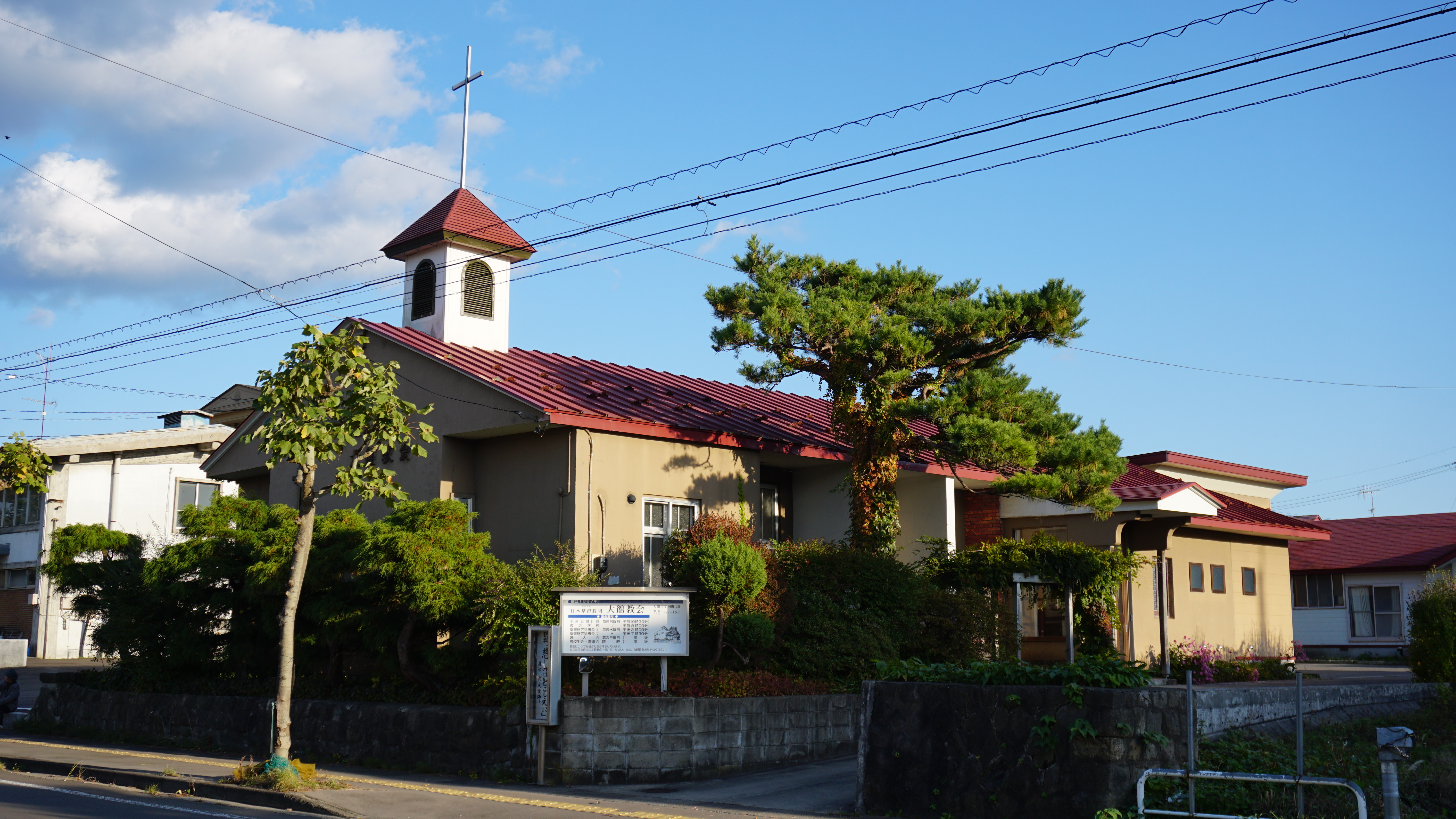 日本基督教団大館教会